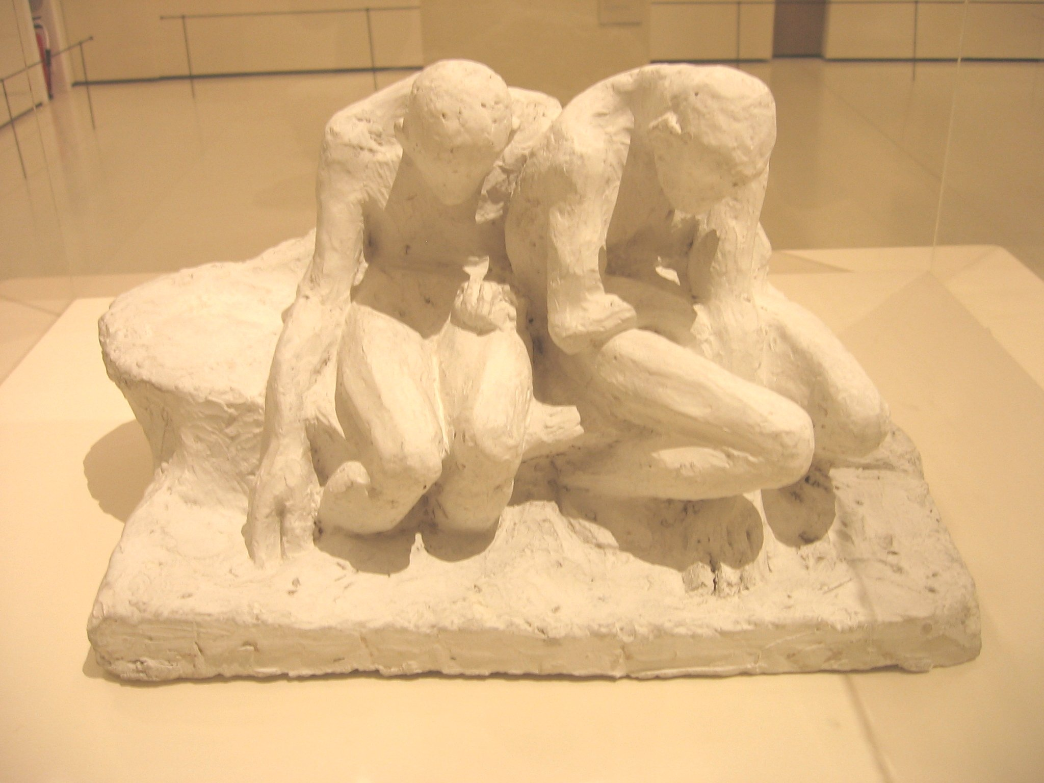 Carles Mani, Los degenerados, 1891-1904, MNAC, Barcelona.